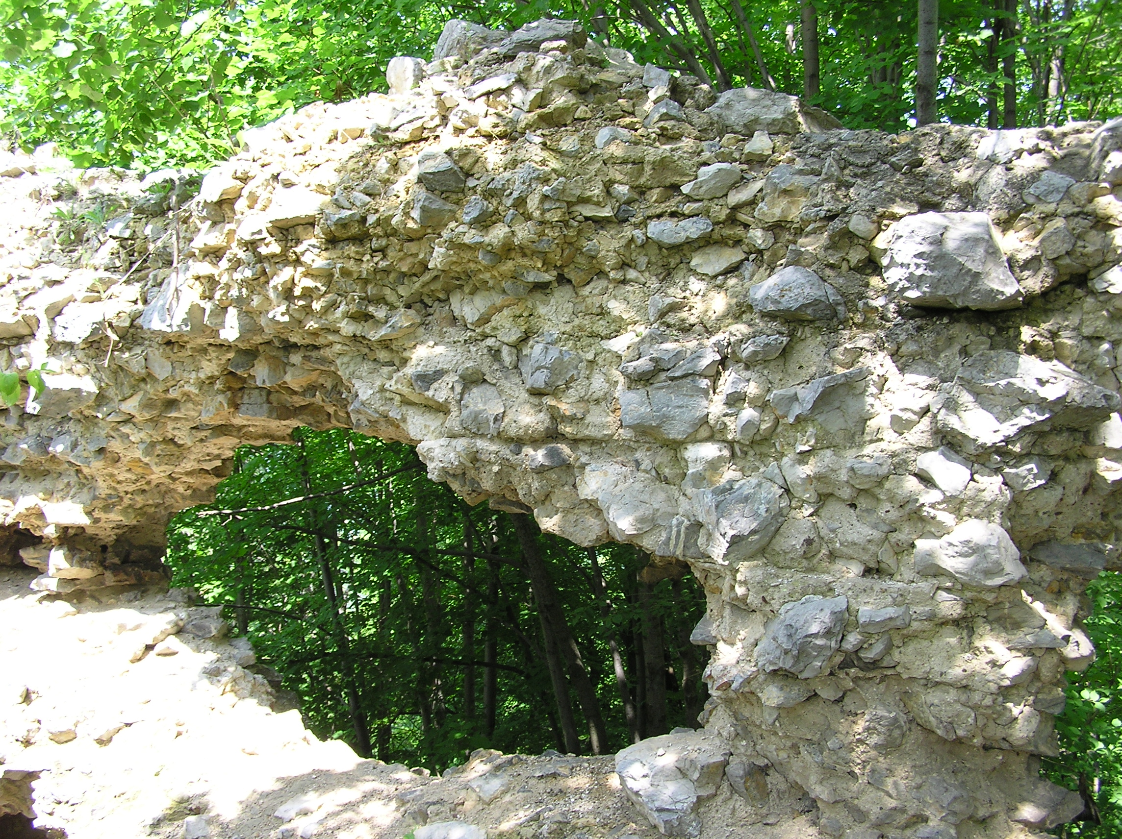 Dédesi várrom részlet nyáron